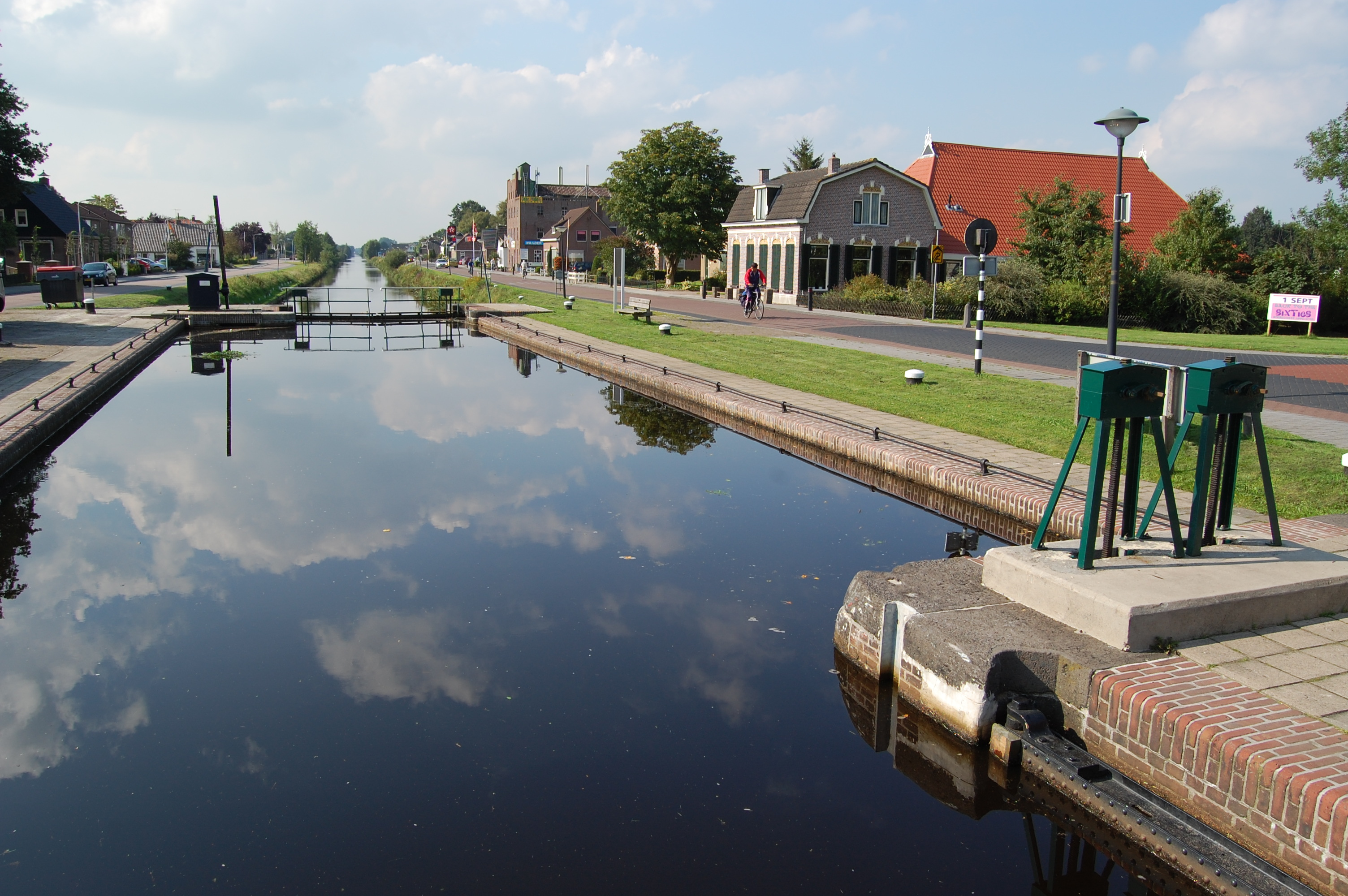 Het Stokersverlaat (sluis) te Appelscha in de Opsterlandse-Compagnonsvaart vanaf de andere zijde.